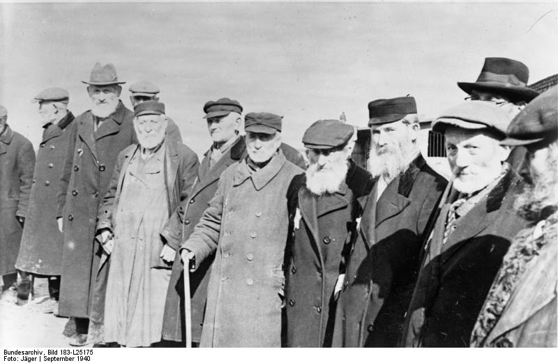 Polen, Kutno, Juden im Ghetto Generelgouvernement: Die Bewohner des Ghettos in Kutno. PK-Jäger-Scherl Bilderdienst 655-41 Sep. 1940 [Polen, Kutno.- Jüdische Männer im Getto]